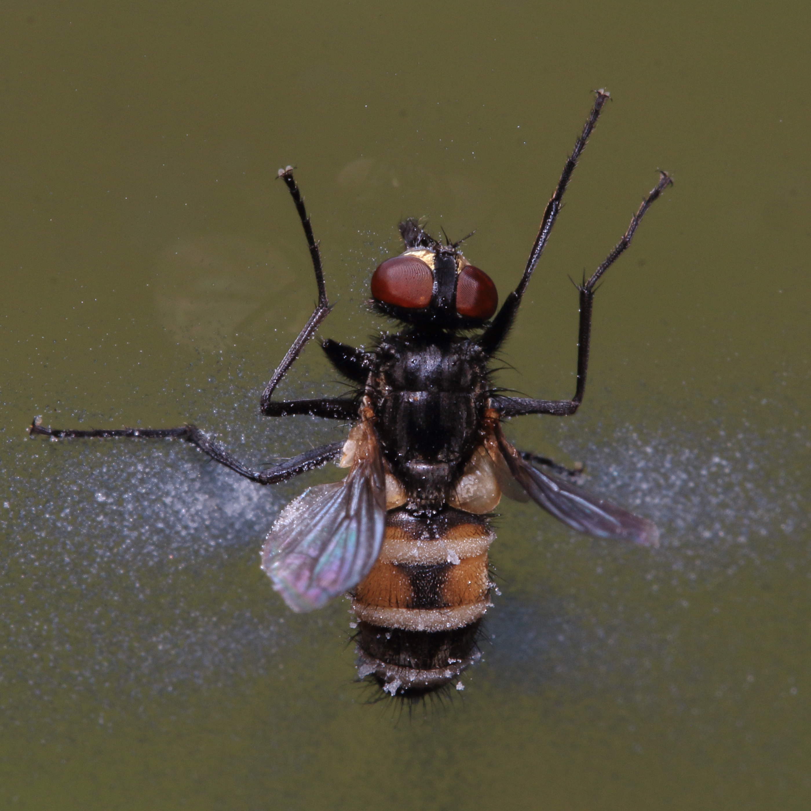 Stubenfliege Musca domestica am Fenster, getötet vom Fliegentöter, höchstwahrscheinlich Entomophthora muscae und umgeben von dessen Pilzsporen Die abgebildete Fliege und der Pilz wurden am 26./28. August 2017 von Tony Irwin und Stephane Lebrun auf bestimmt, auf Grund meiner (Norbert) Anfrage dort vom 25. August 2017 The fly and the fungus shown here has been identified by Tony Irwin and Stephane Lebrun on 2017, August 26th/28th, my (Norbert) question there dated 2017, August 25th